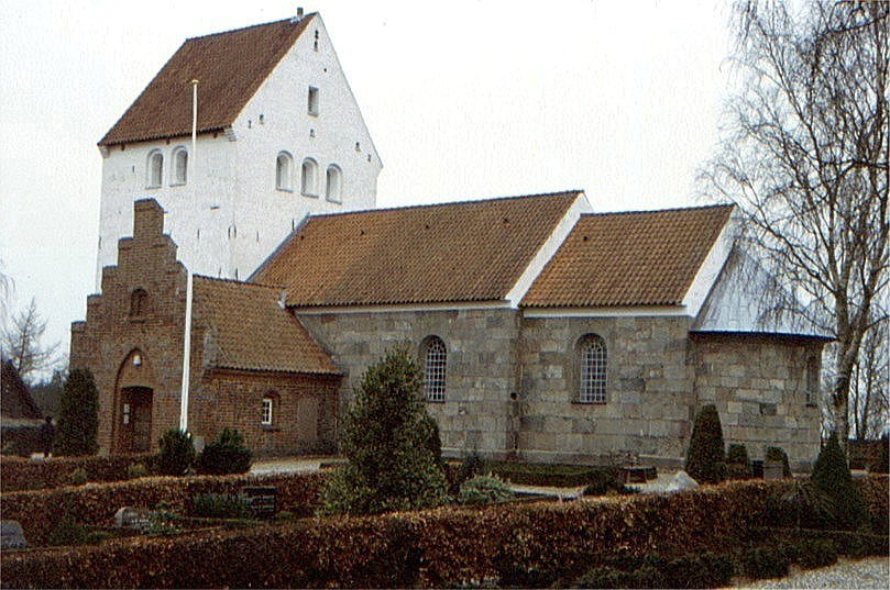 Gerning Kirke set fra sydøst, Faurskov Kommune, Jylland, Denmark